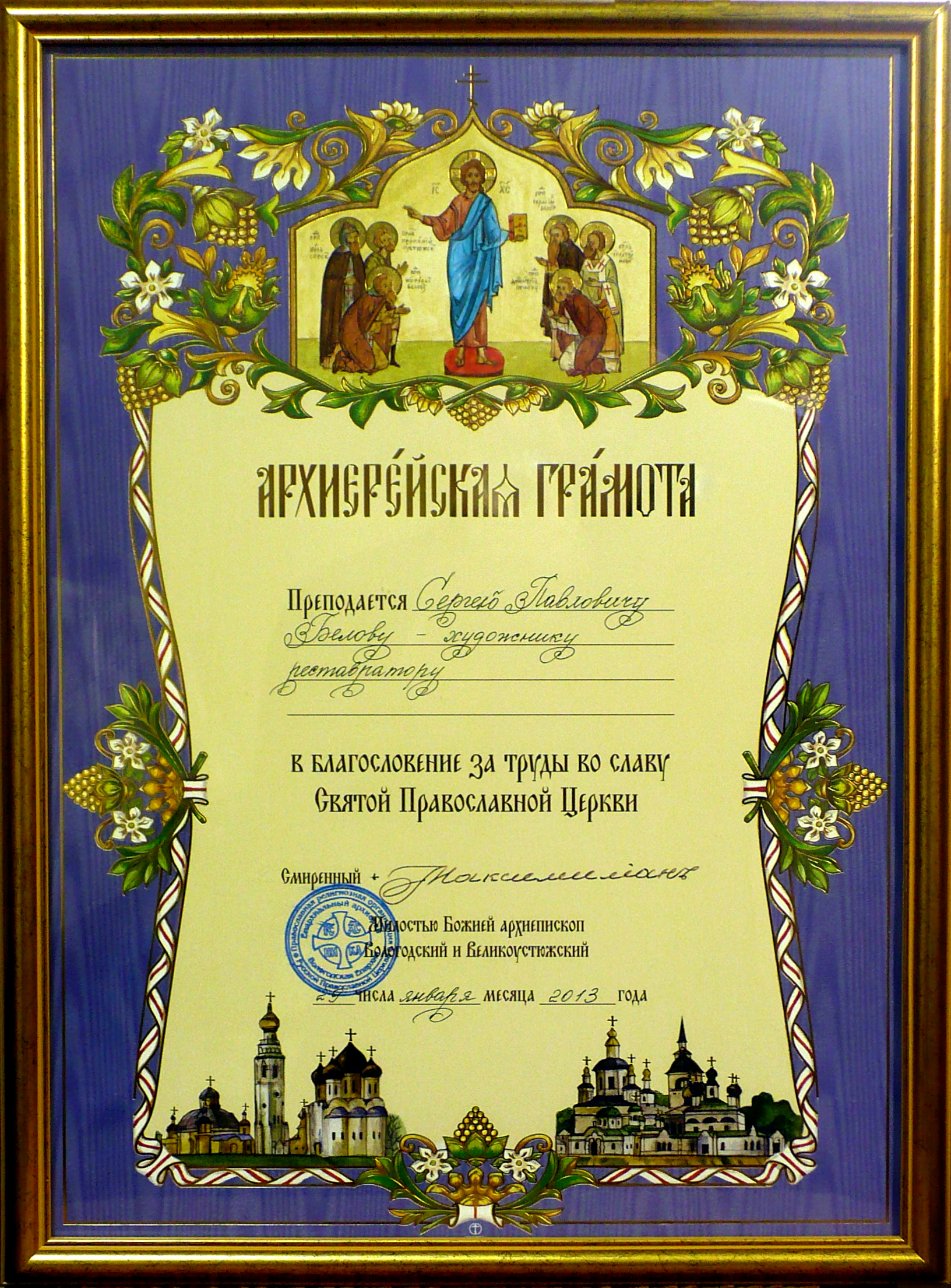 Архирейская грамота Белову С.П.